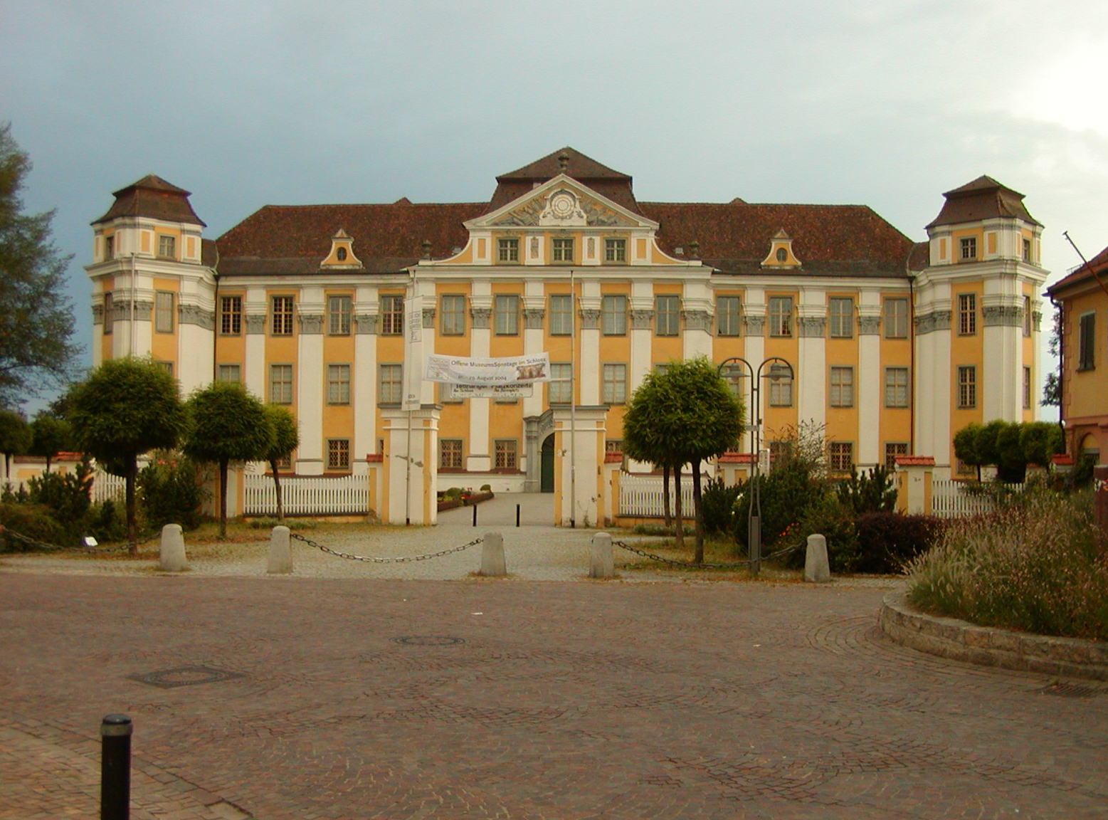 Neues Schloss in Tettnang, Deutschland